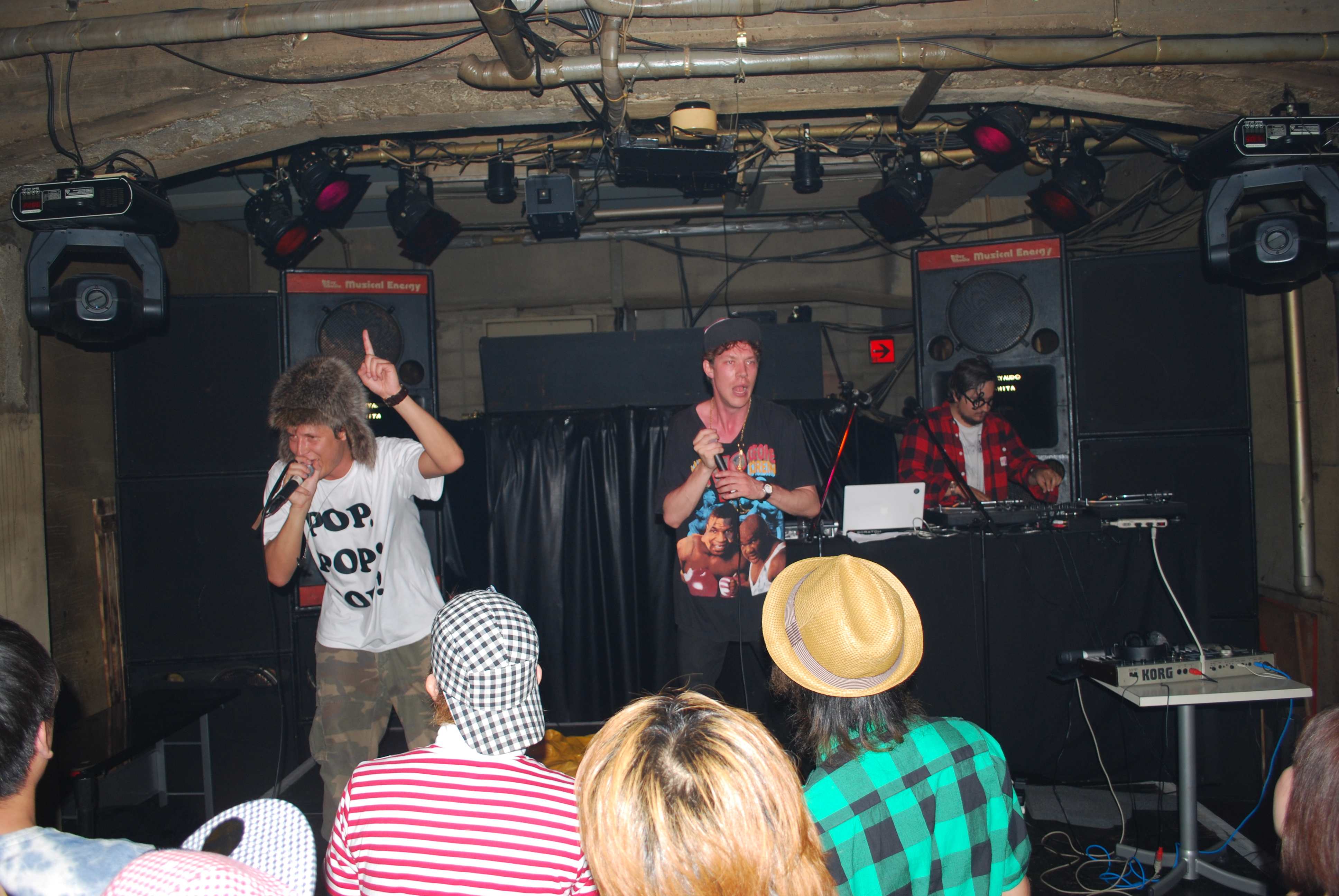 Speech Defect live Tokyo 2009 på turné med Happy Hunting